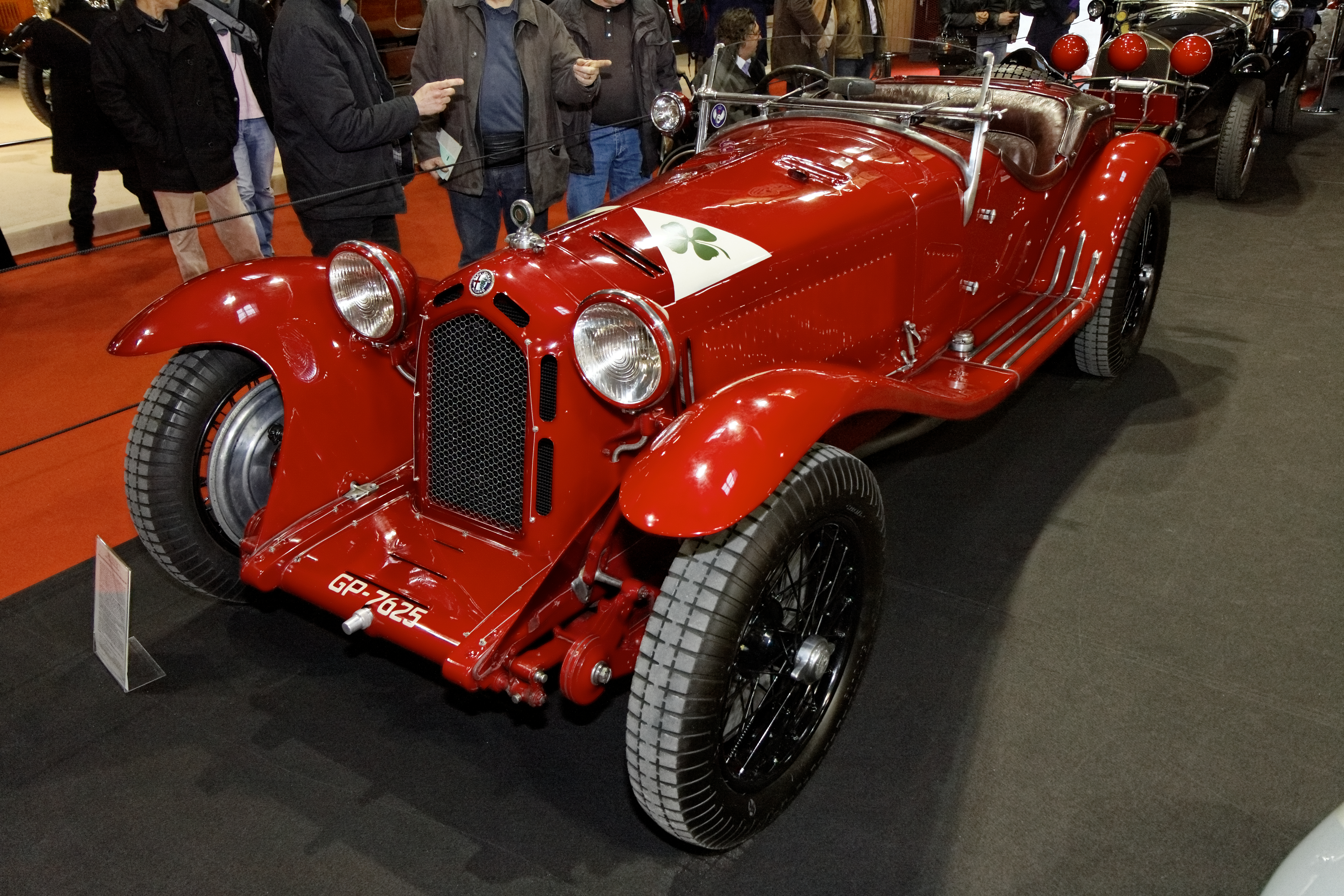 Alfa Romeo 8C2300 Mille Miglia